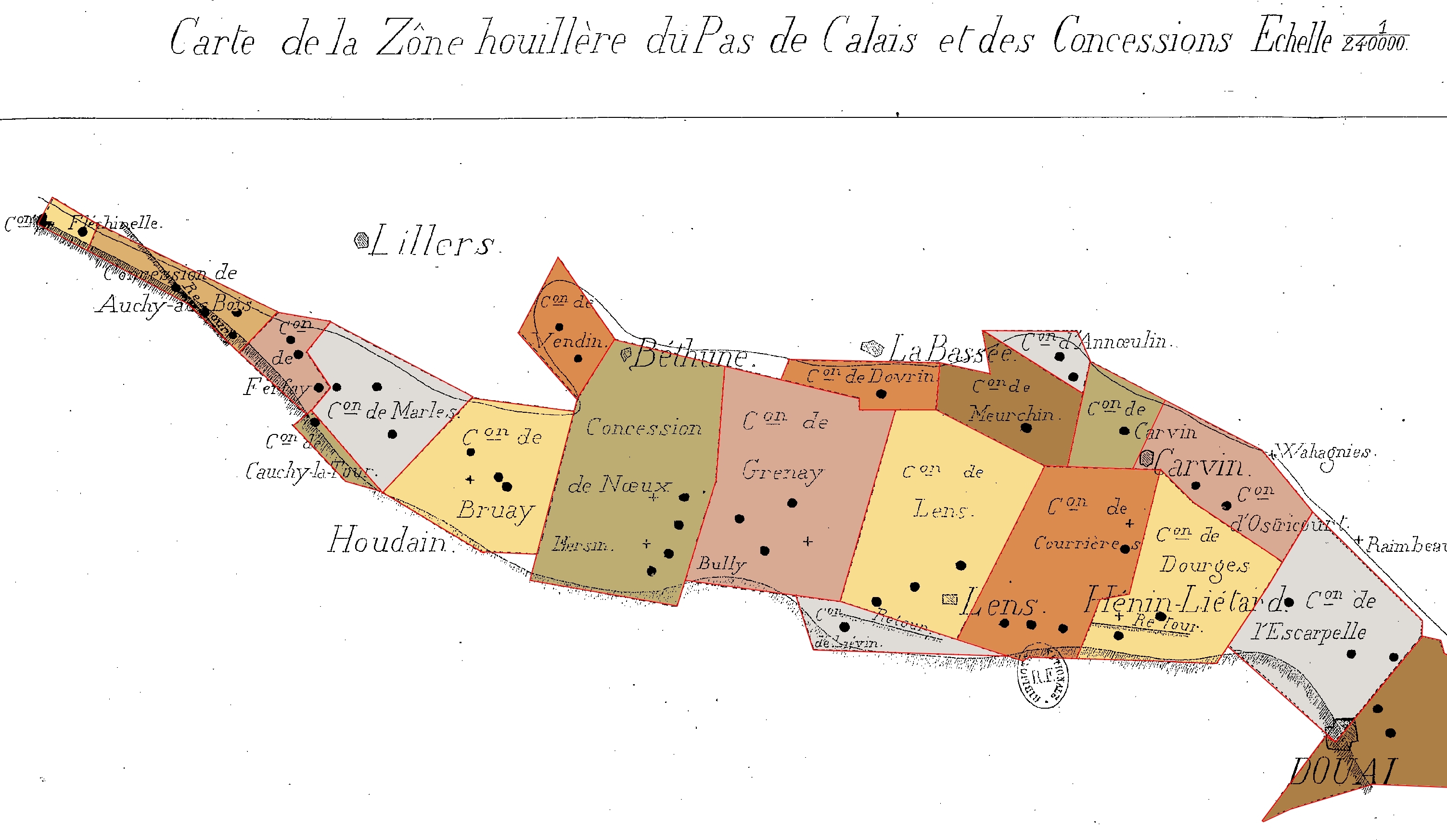 Compagnie des mines d'Auchy-au-Bois.